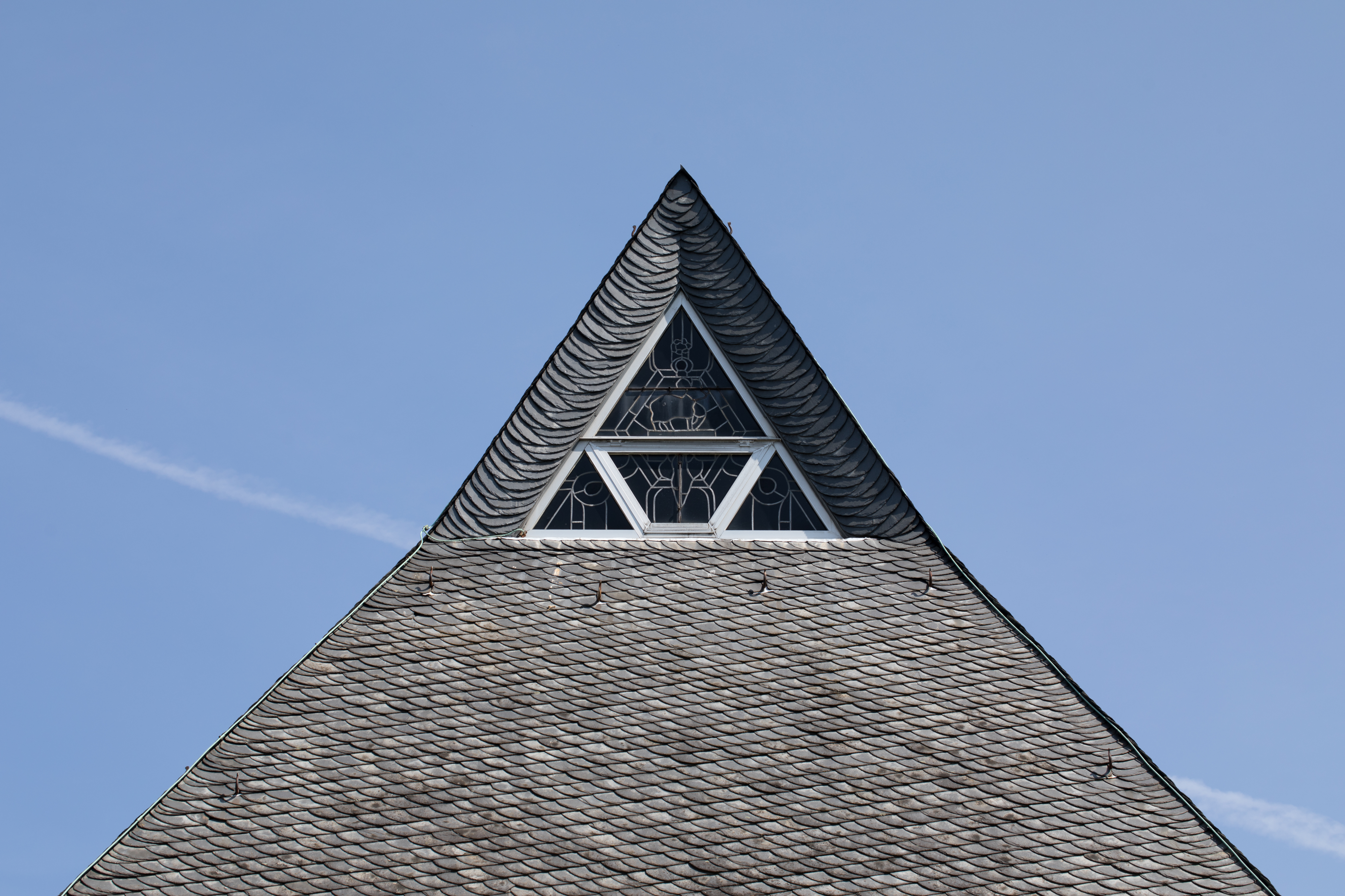 Kirche St. Petrus und Paulus, ursprünglich Klosterkirche Vom Guten Hirten, Köln-Lindenthal; Architekt: Fritz Schaller